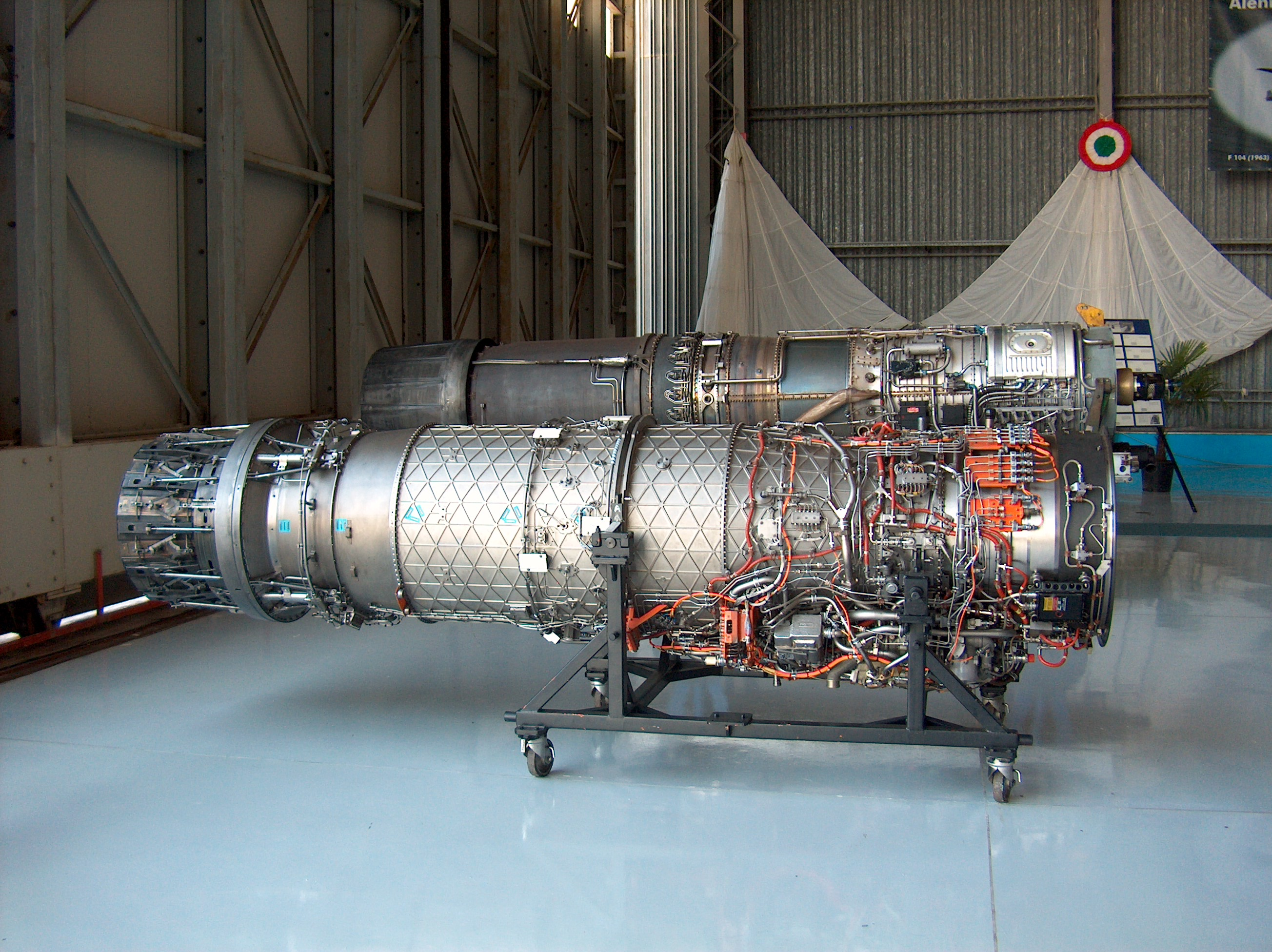 Im Vordergrund ist das Eurofighter Triebwerk, dahinter ein J79 Triebwerk (Starfighter).